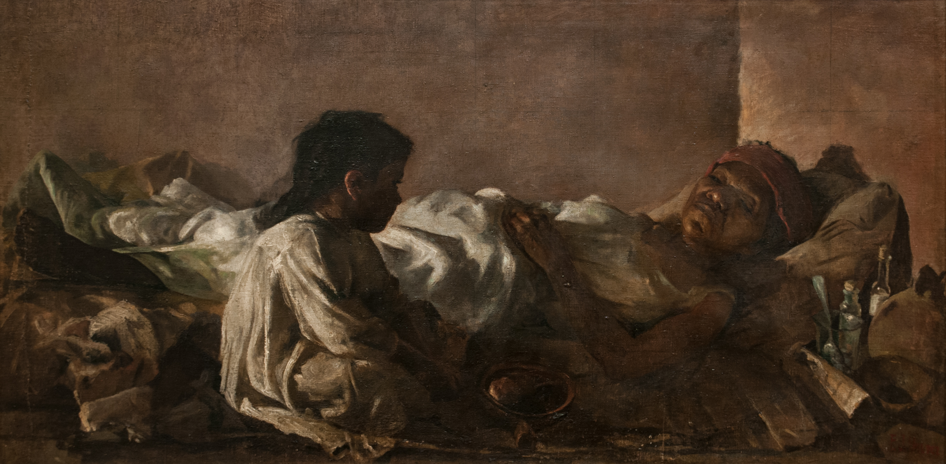 Miseria, sin fecha. Óleo sobre tela 75 x 151 cm. Galería de Arte Nacional, Caracas – Venezuela.